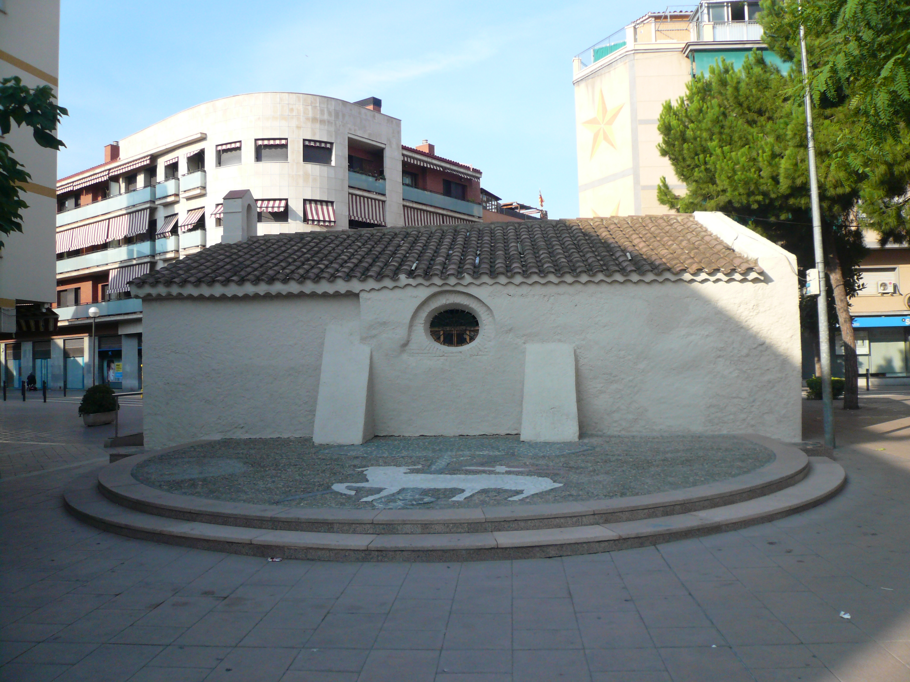 Capella de Santa Maria del Bon Viatge. C. Bon Viatge (Sant Joan Despí). Object location41° 22′ 00.82″ N, 2° 03′ 22.08″ E